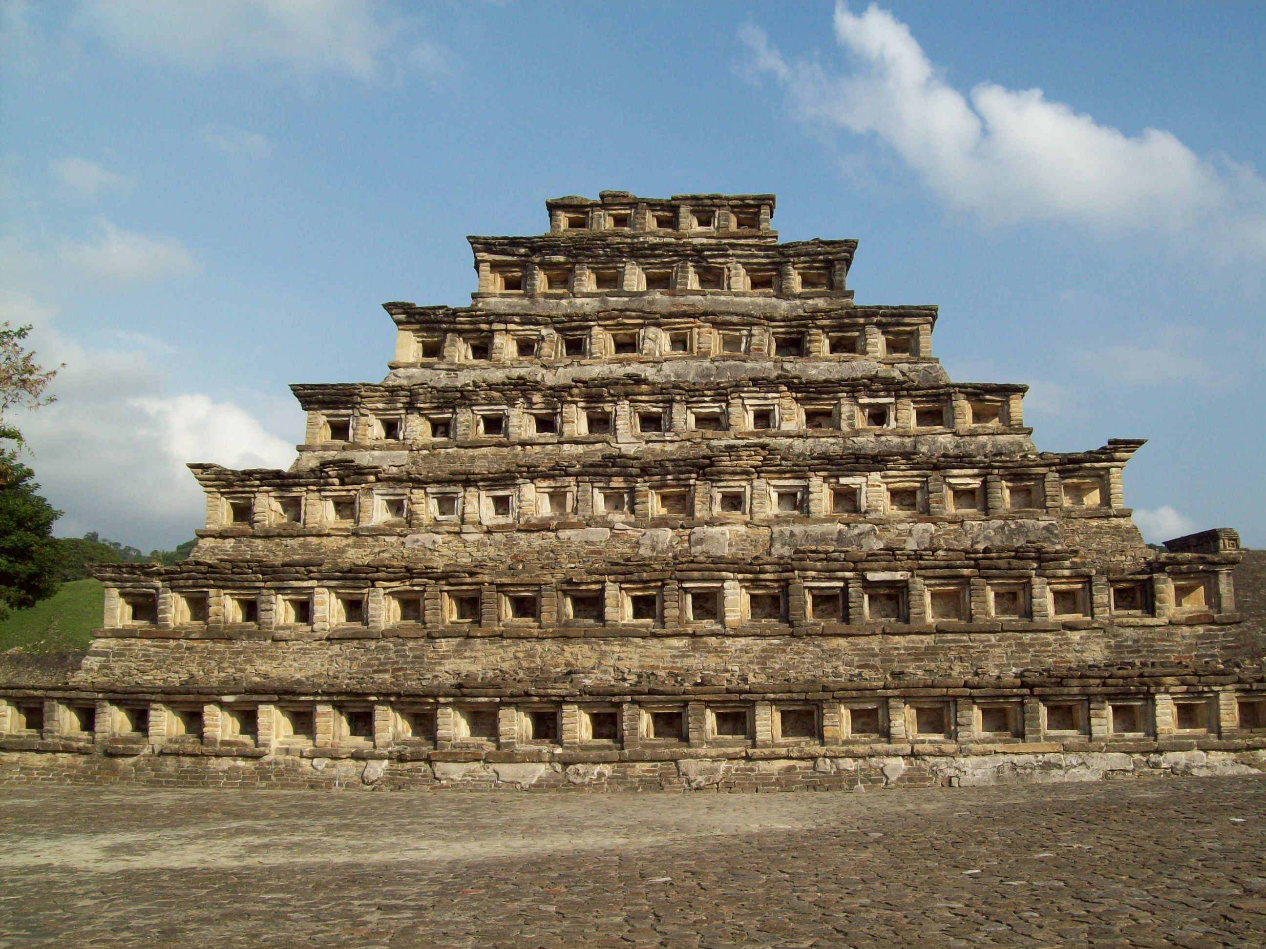 El Tajin.